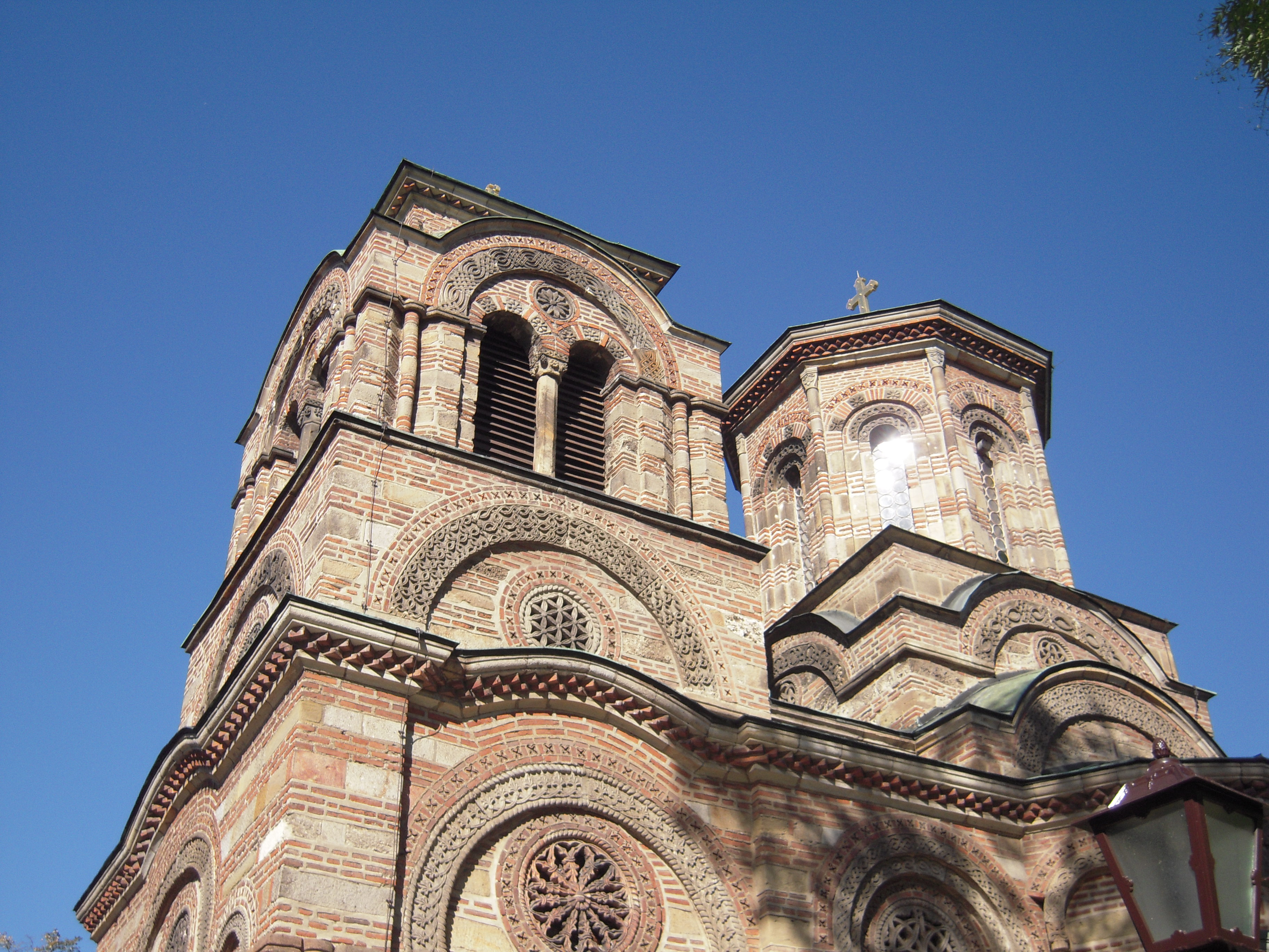 Црква Лазарица